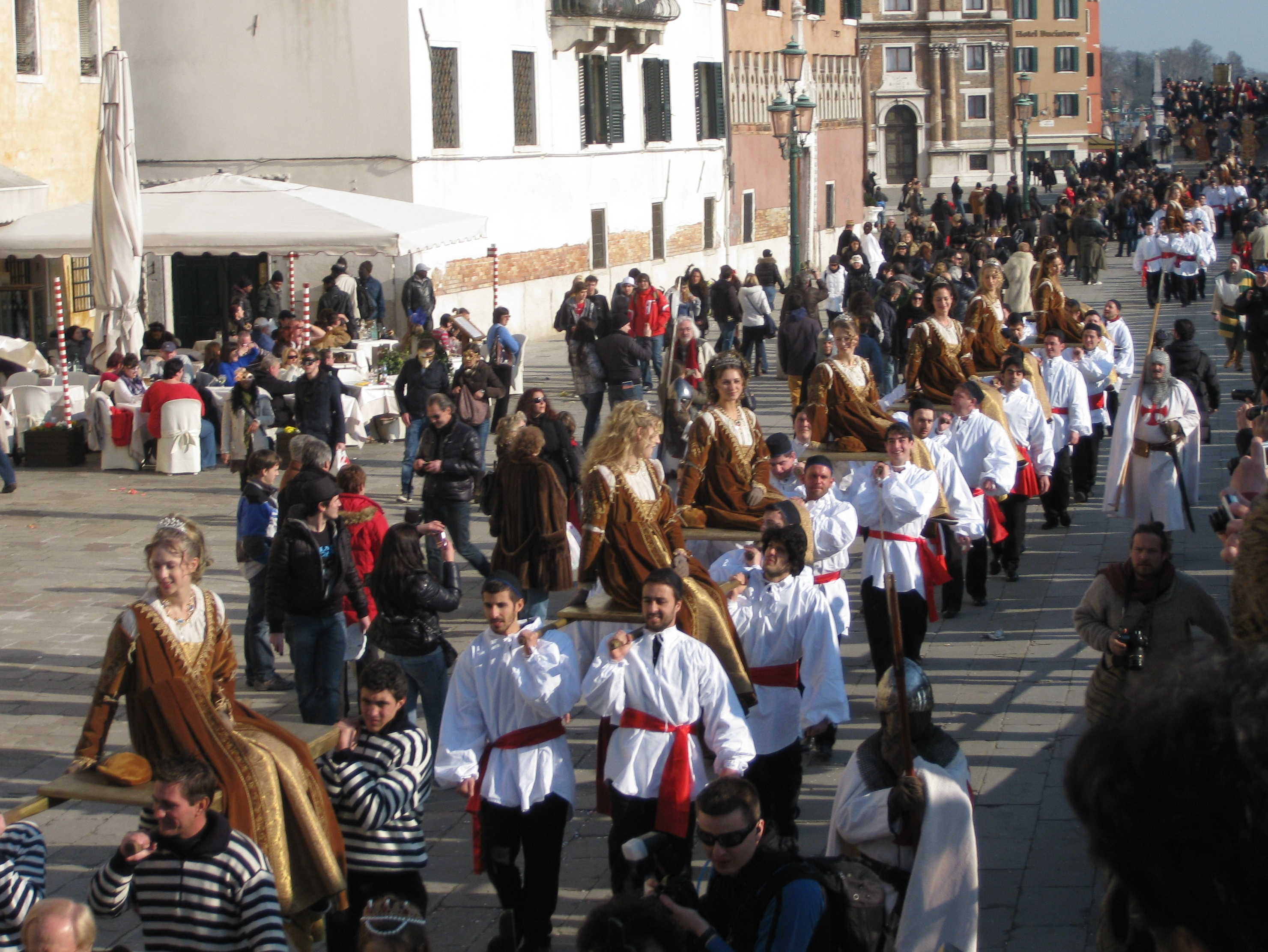 Carnevale di Venezia 2011 - Festa delle Marie